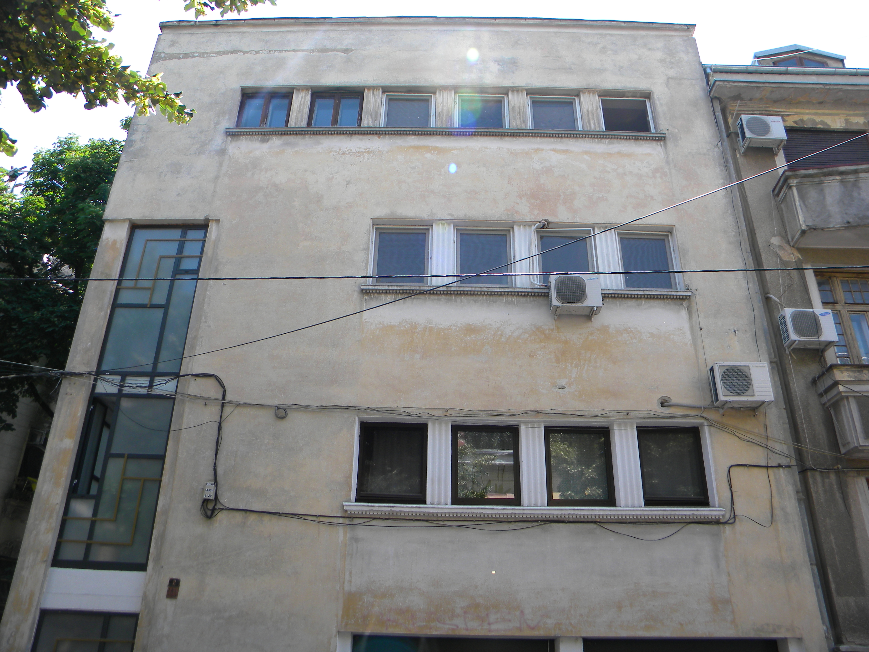 Bucuresti, Romania, Str. Caimatei nr. 8, sect. 2, B-II-m-B-18268